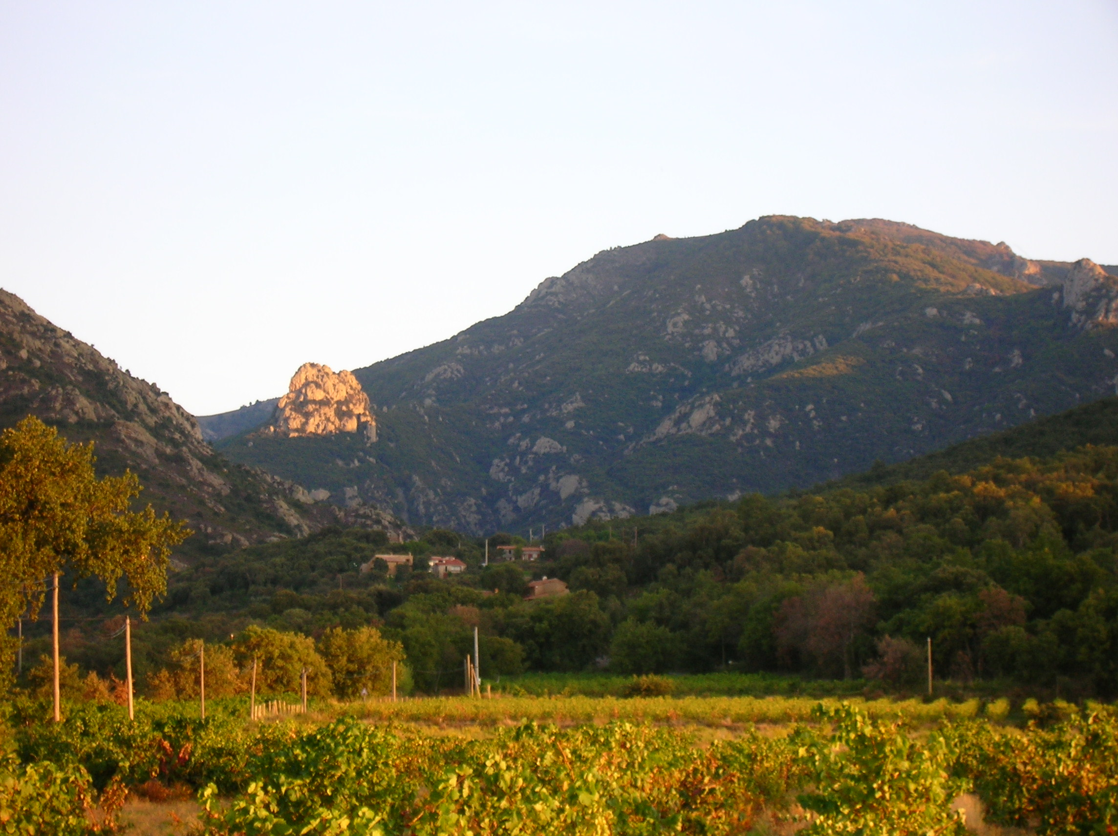 (Les Albères: vue des gorges de Lavail avec au fond le rocher de Montbram (commune de Sorède). (Photographie personnelle).